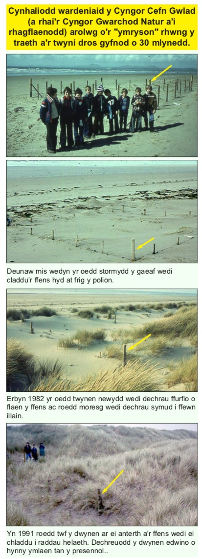 Newid ar draeth Morfa Harlech dros 30 mlynedd 1978-2010 (polyn mesur â saeth melyn)